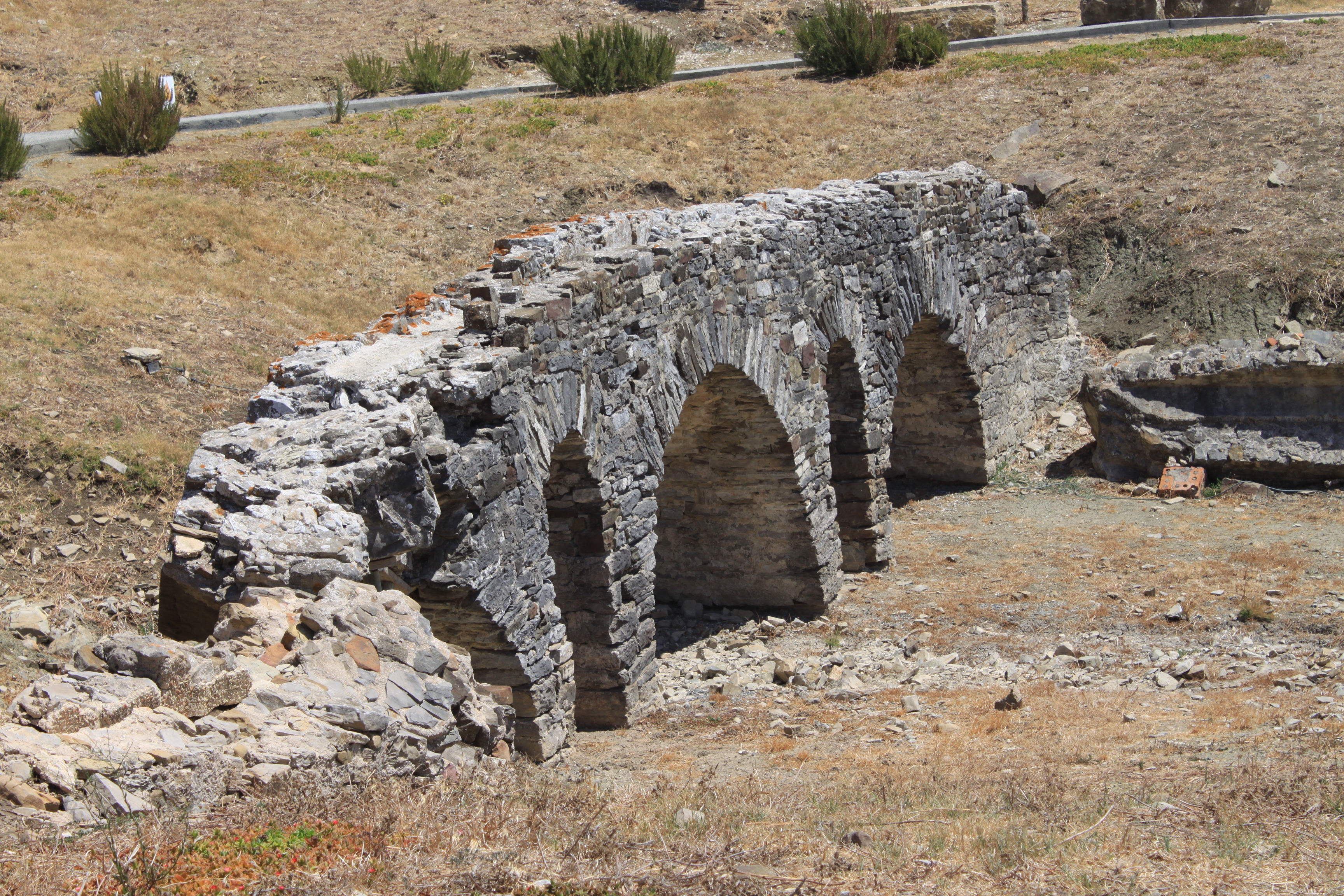 Restos del acueducto de Realillo de Baelo Claudia, Tarifa, Andalucía, España.